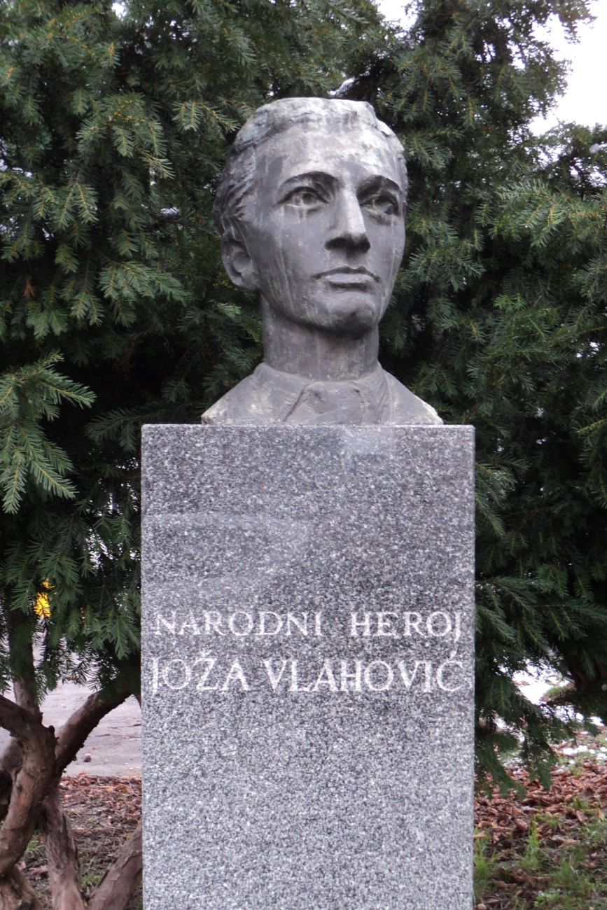 Poprsje Jože Vlahovića u Zagrebu, Trešnjevka